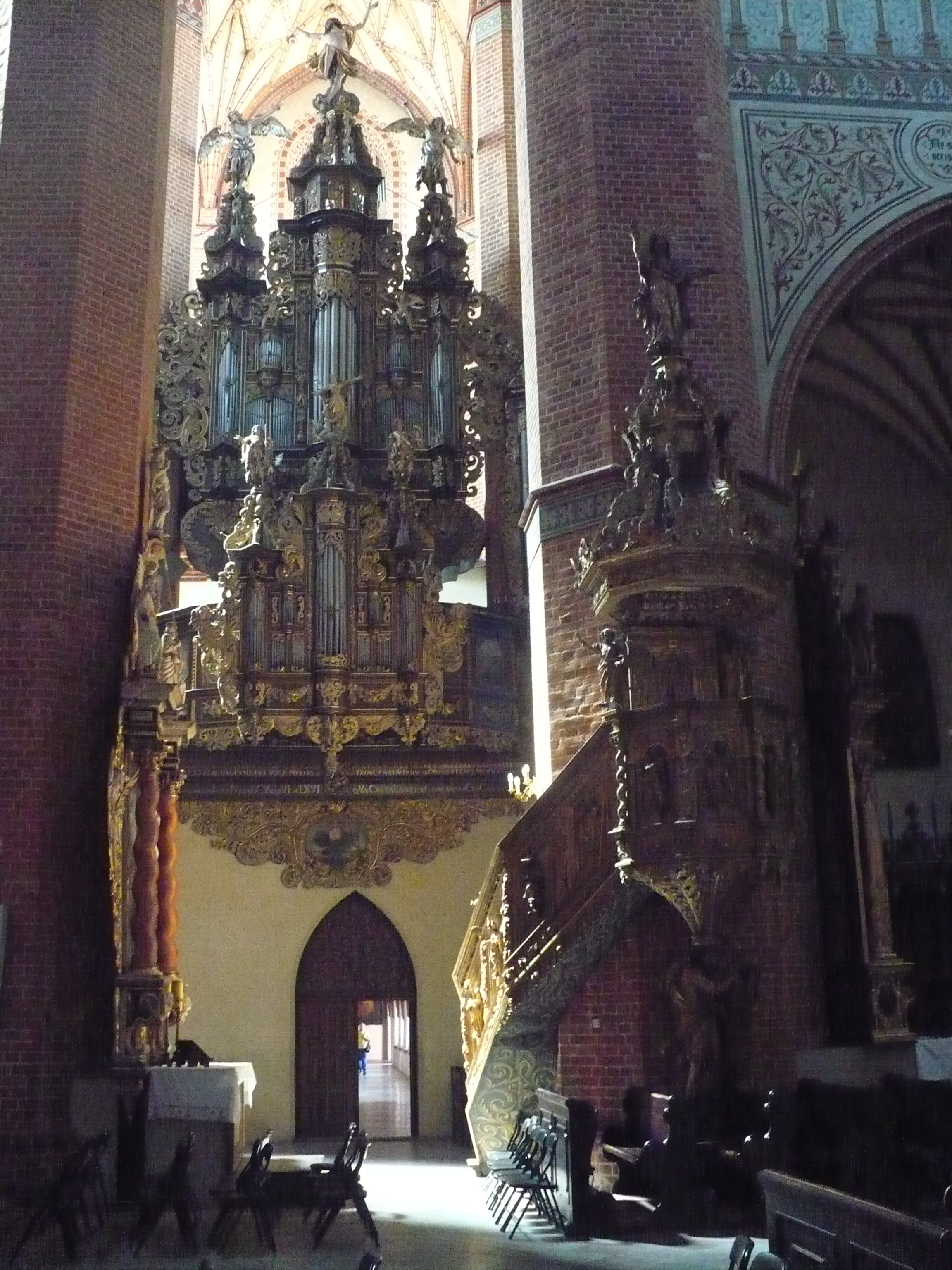 Pelplin, kościół, ob. katedra p.w. NMP, 1280-1350, 1557, 1894-1899